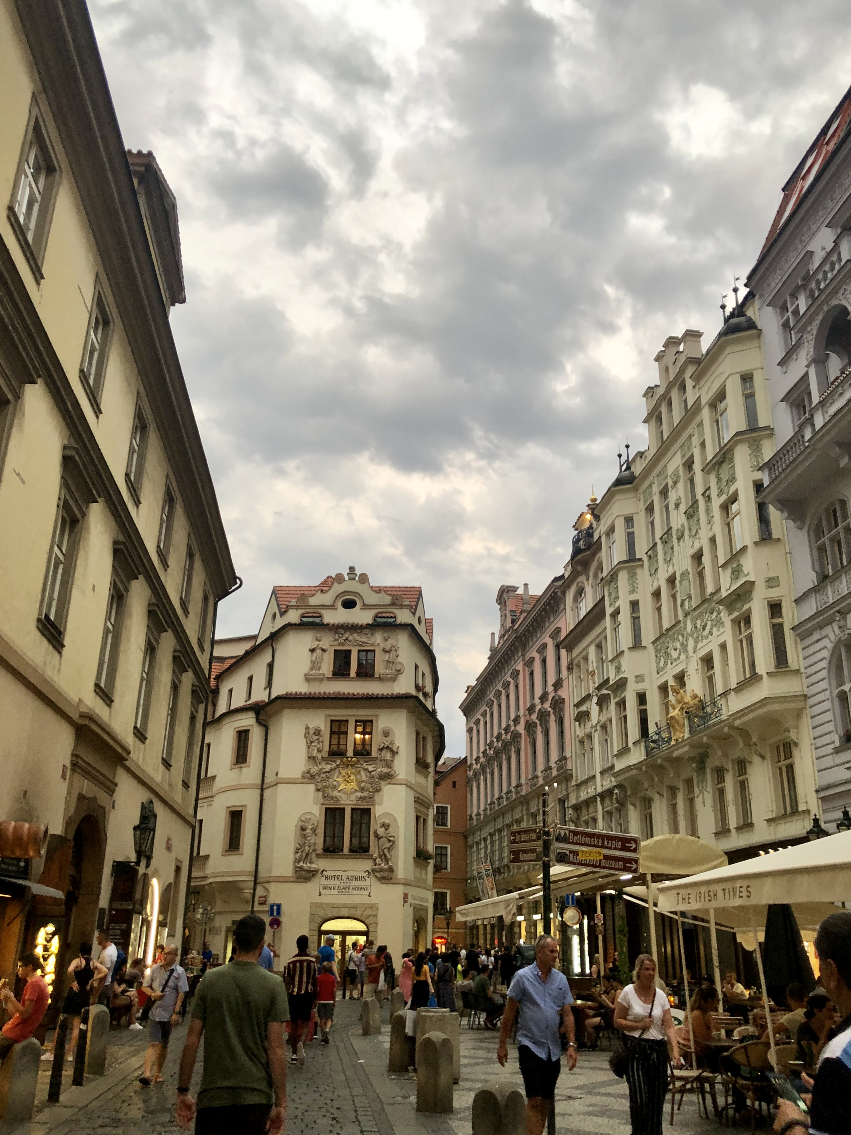 Foto tomada en Praga en Julio 2019